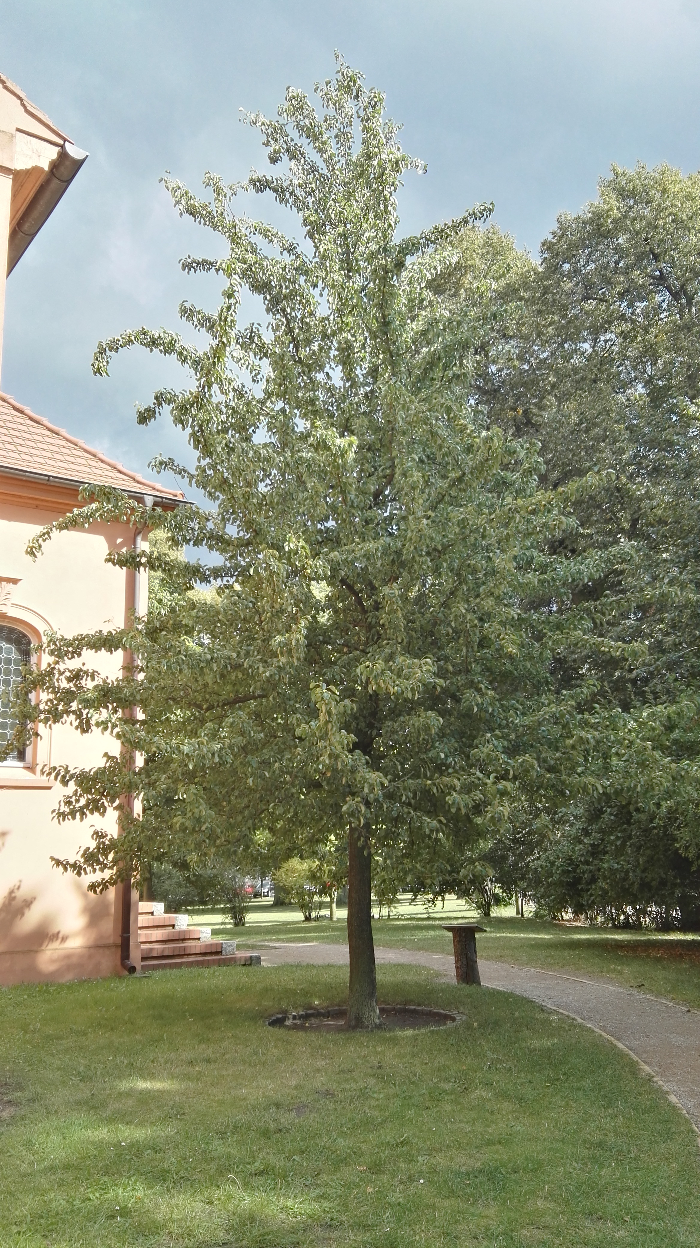 Birnbaum vor der Kirche in Ribbeck im August 2016